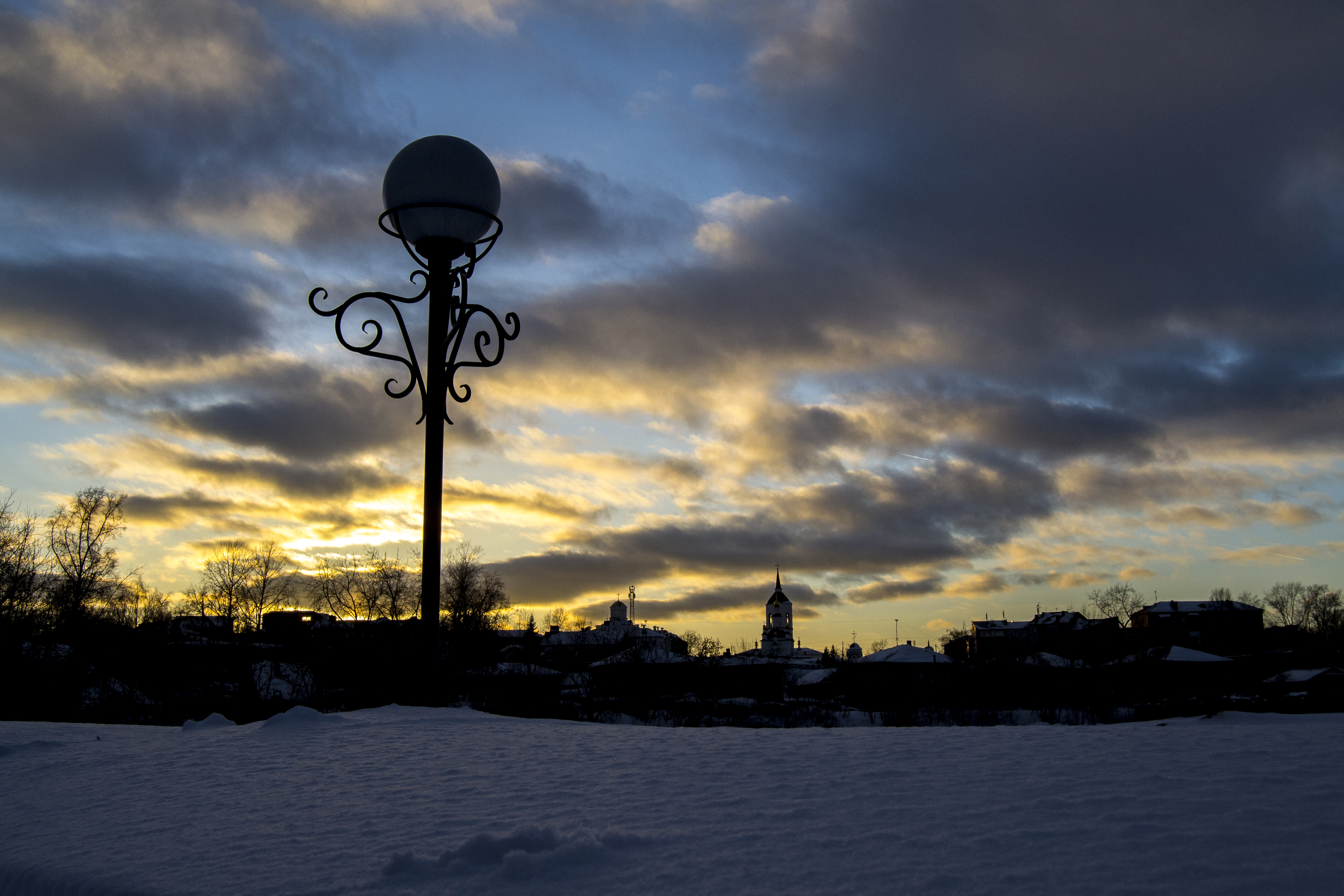 Закат на улице Сибирской, в сквере на берегу Ушайки